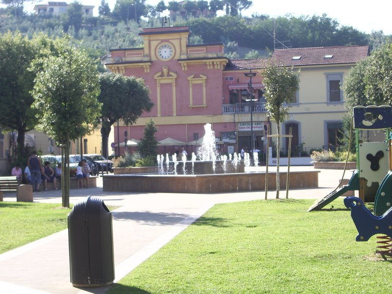 Limite sull'Arno